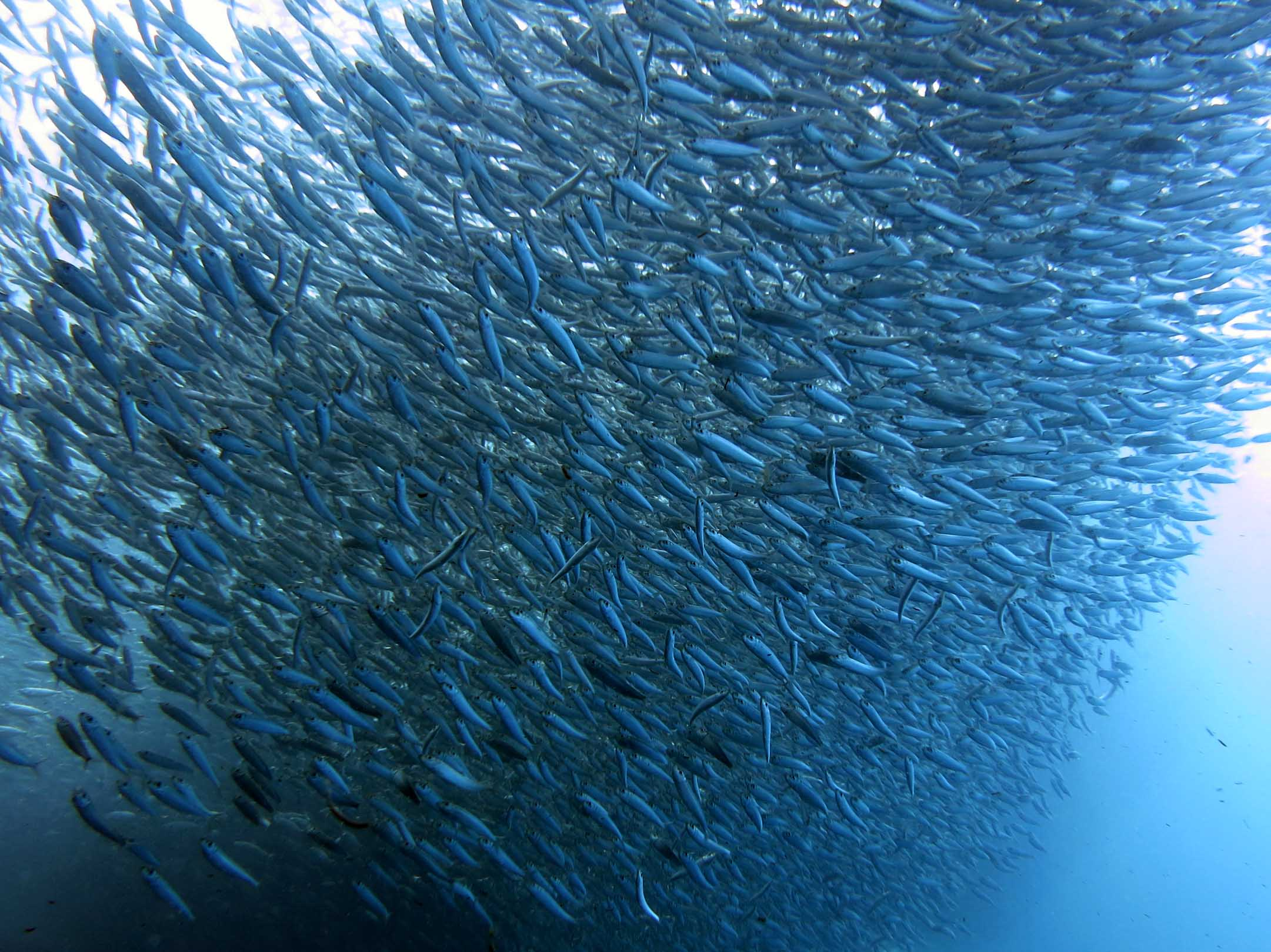 2014 11 Moalboal 21 sardine run